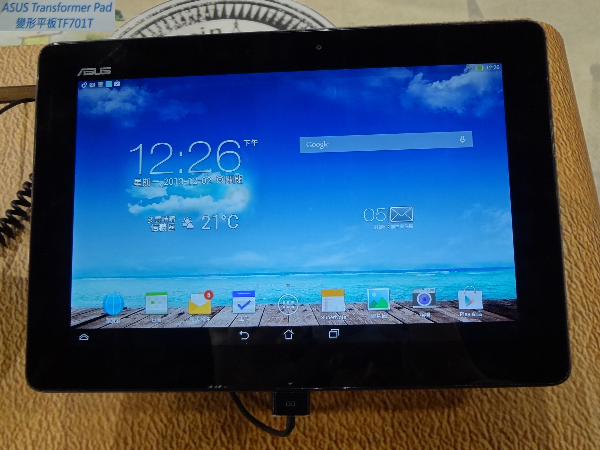 2013年資訊月的華碩變形平板TF701T。